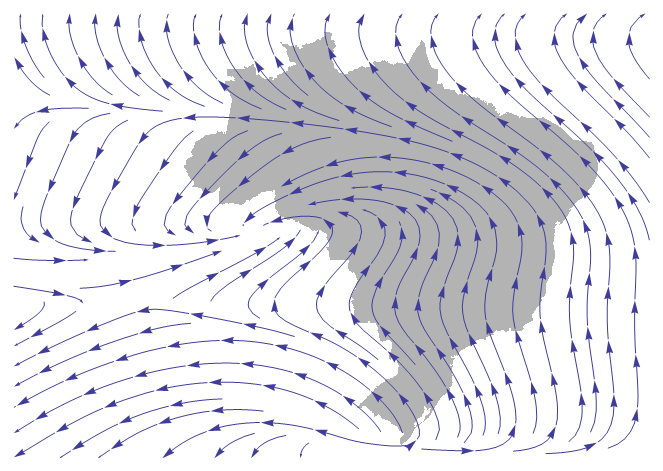 Modlização da direção média anual dos ventos no Brasil